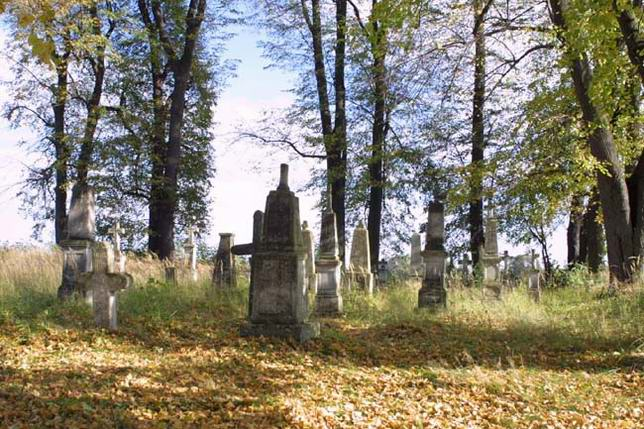 Cmentarz ewangelicki w Podlesiu.